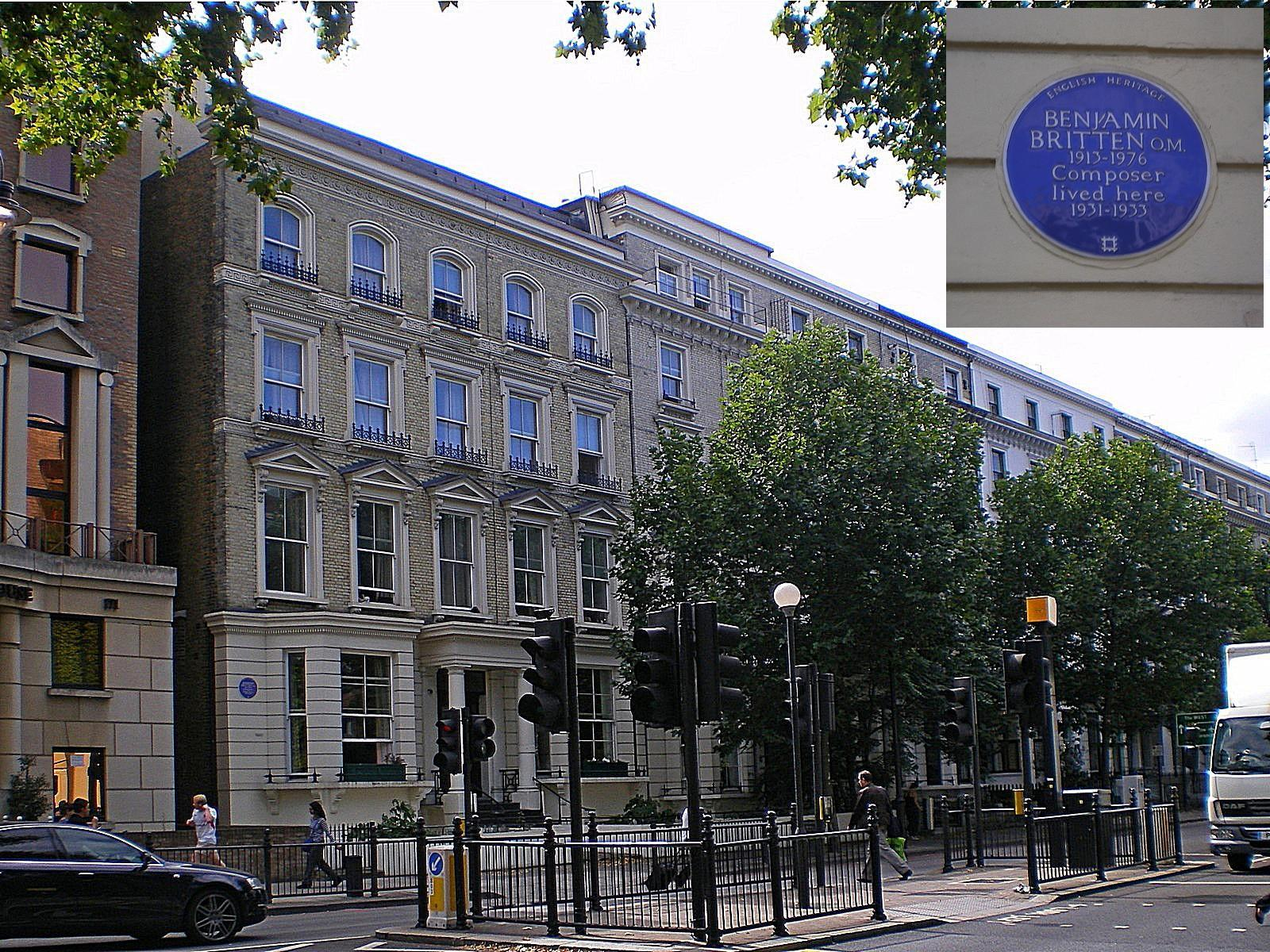 Dom w Londynie przy Cromwell Road, w którym mieszkał kompozytor Benjamin Britten.